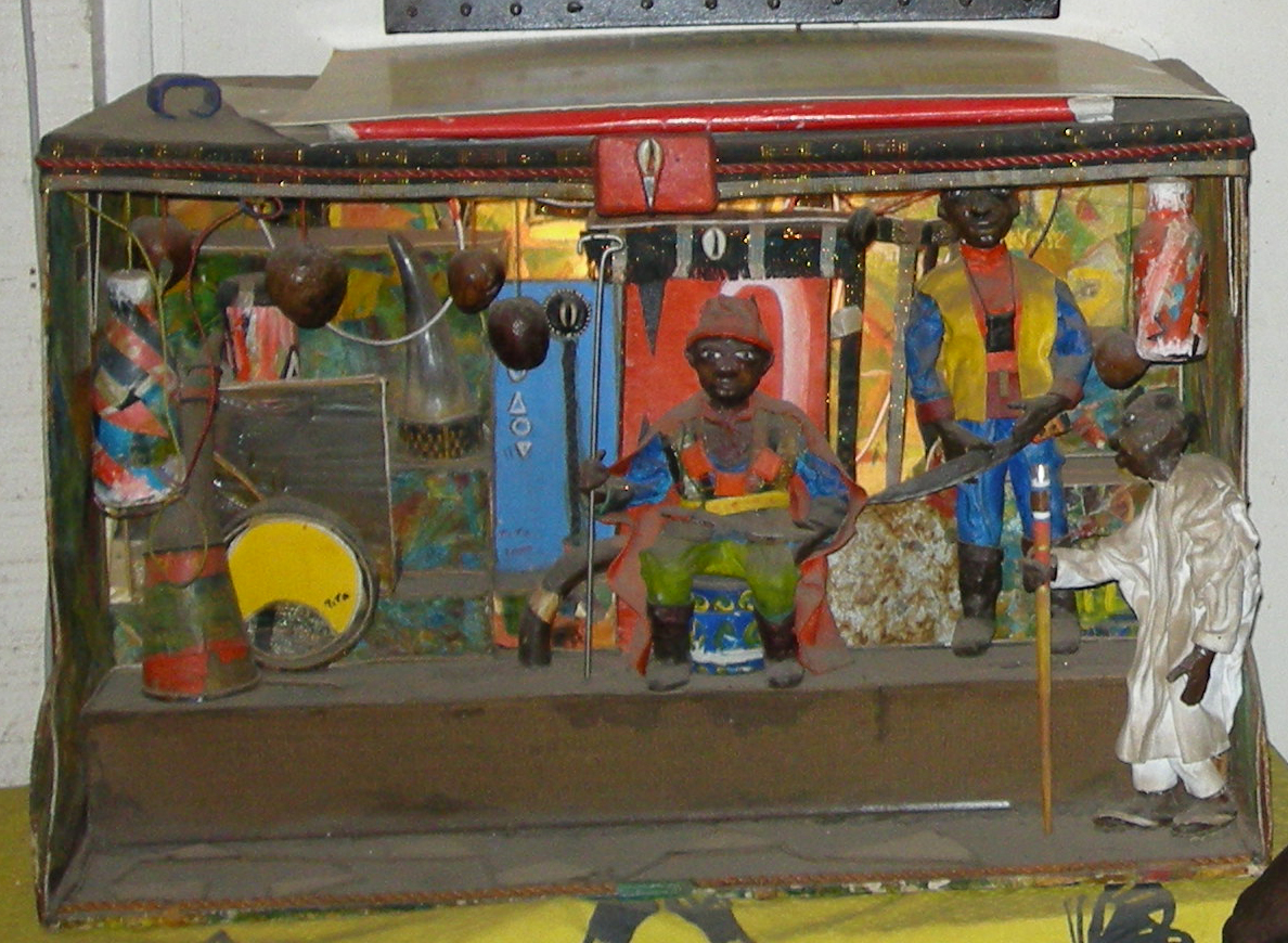 "Théâtre en boîte", une réalisation de l'artsiste sénégalais Amadou Makhtar Mbaye, mettant en scène la visite du philosophe Kocc Barma Fall au damel (roi) du Cayor (Extrait de l'image ci-dessous)